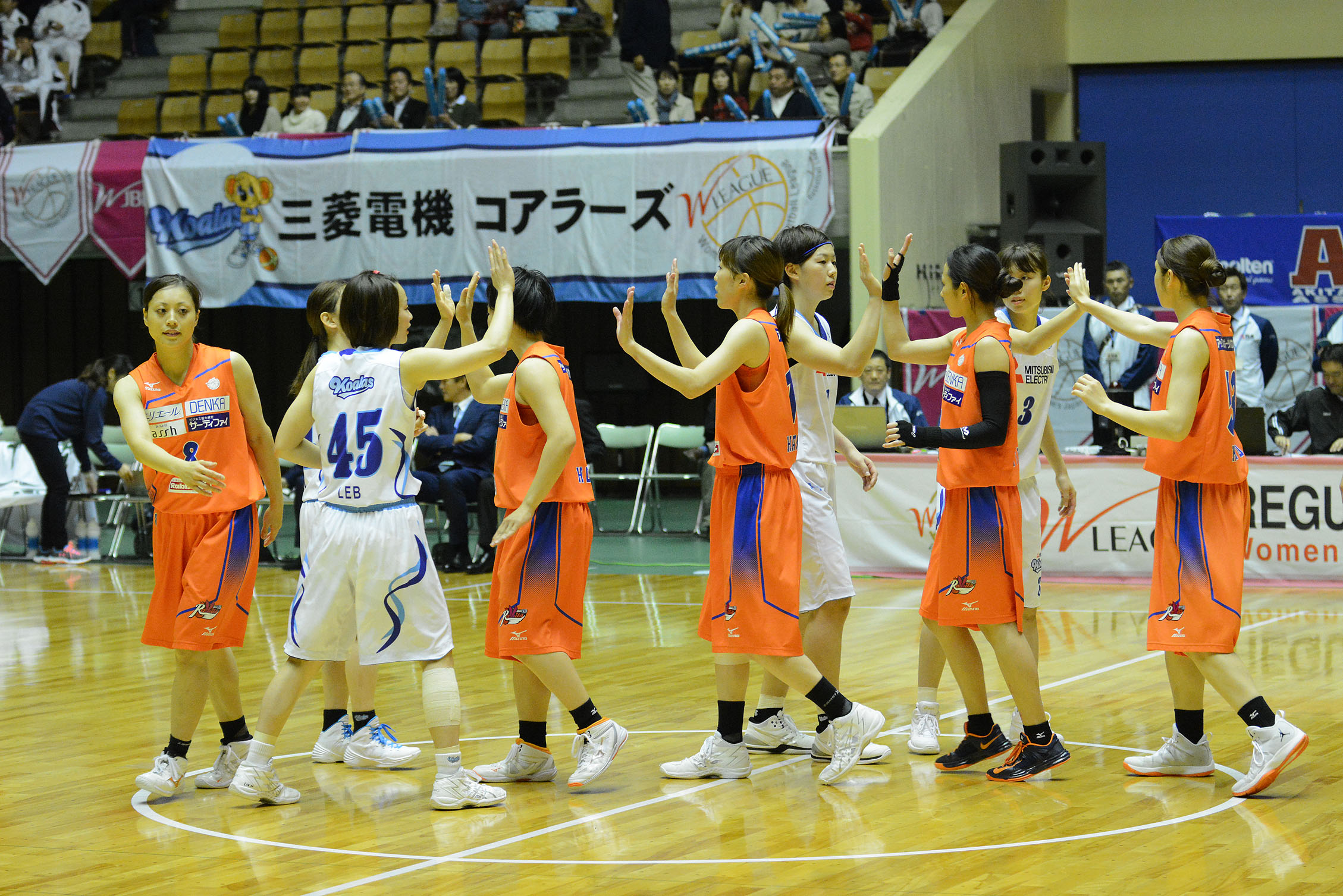 WJBL 14-15レギュラーリーグ、三菱電機対新潟。秋田県立体育館。